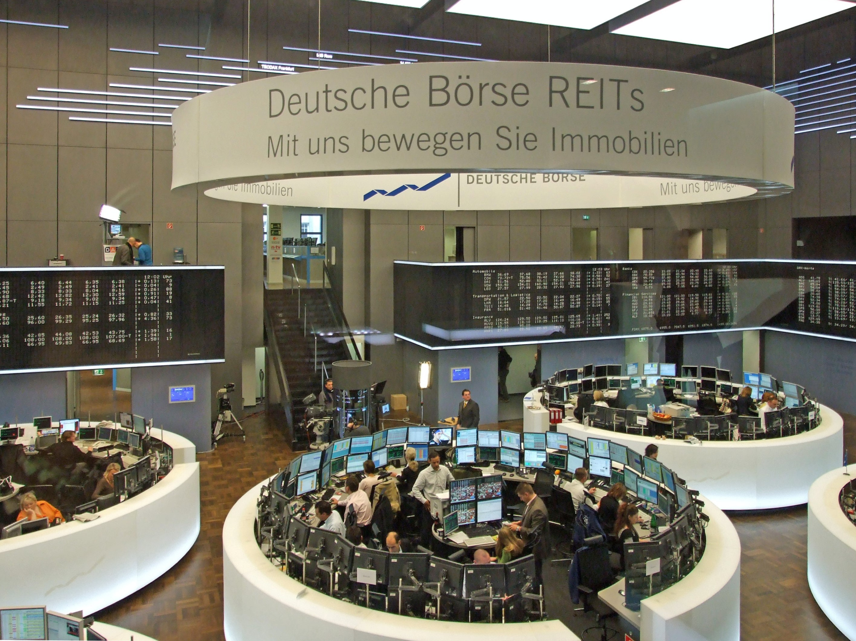 Parkett-Boerse in Ffm